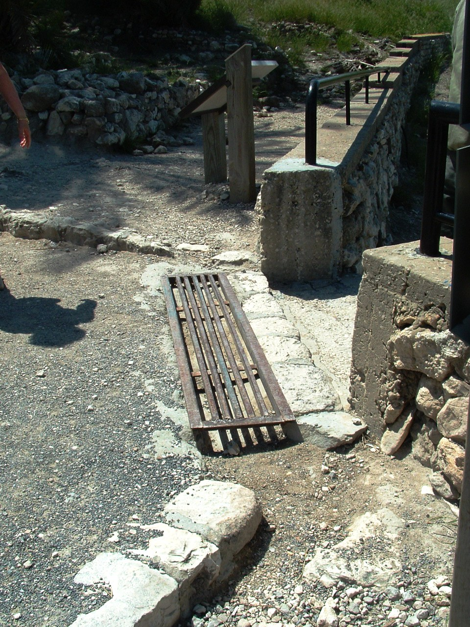 Tell Megiddo - Preservation Problems in years 2005 & 2006 תל מגידו- תמונות שצולמו בשנים 2005 ו-2006 המצביעות על בעיות שימור באתר